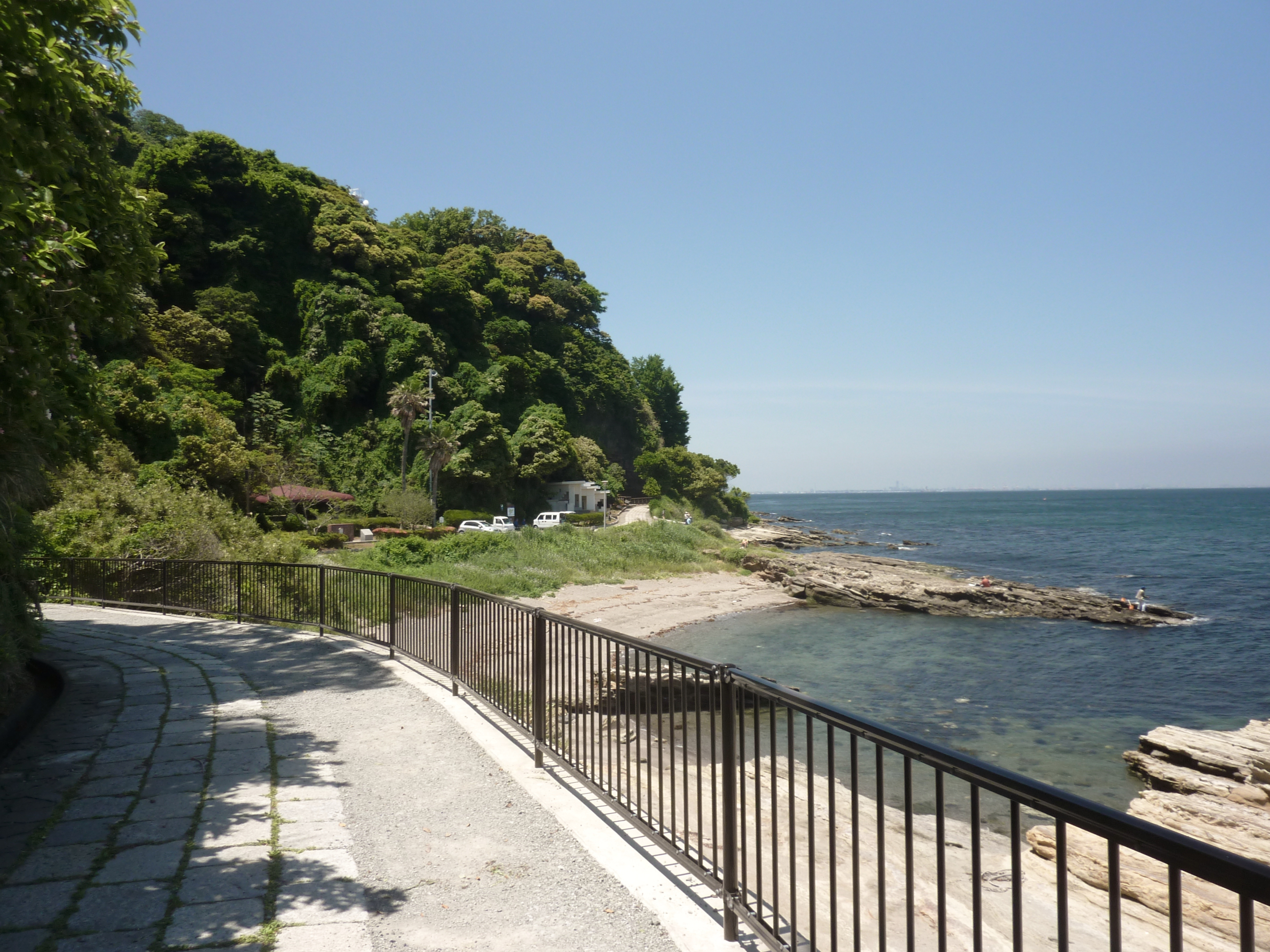 神奈川県横須賀市・観音崎公園の海岸園地